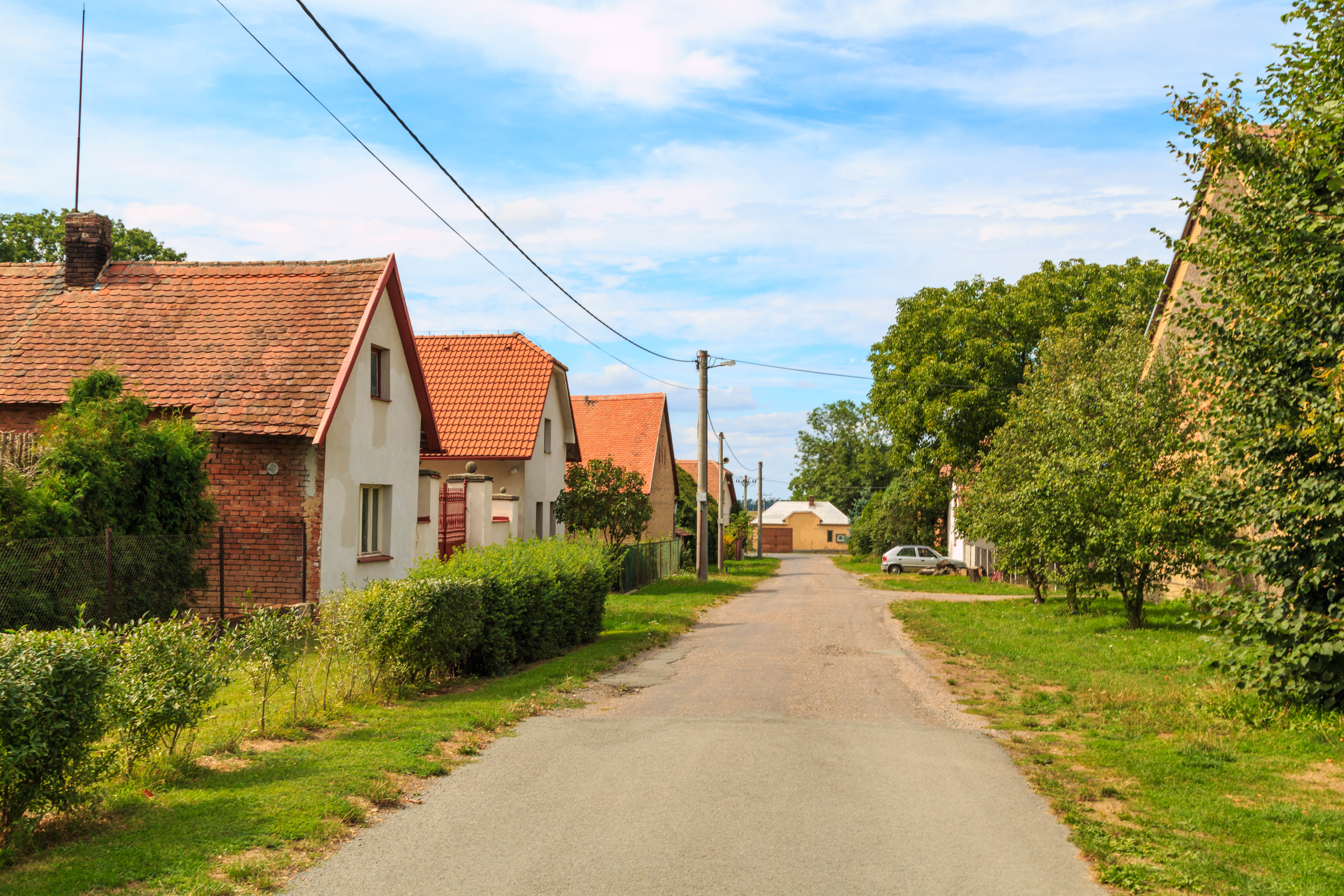 Lipec u Slepotic čp. 11